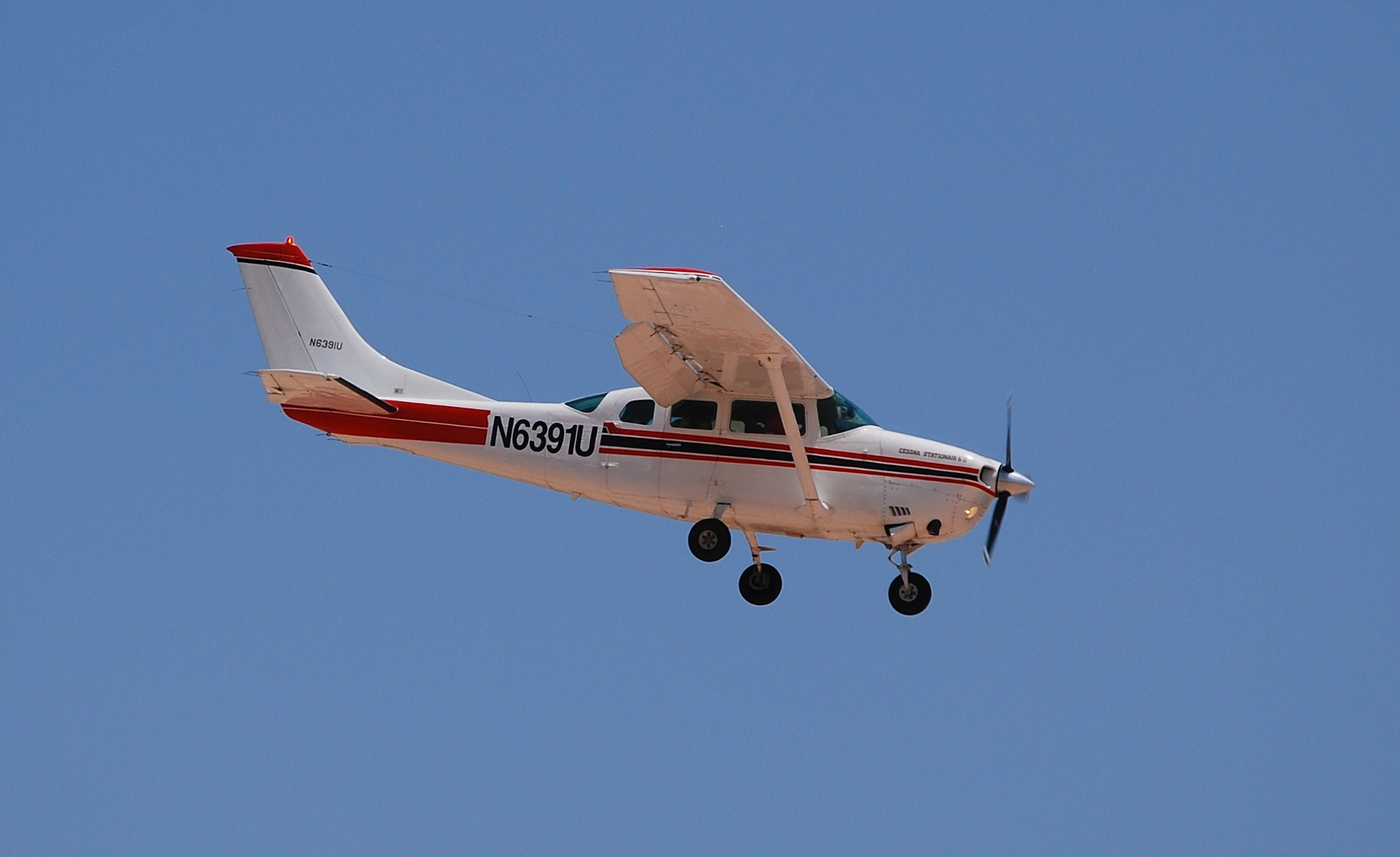 N6391U